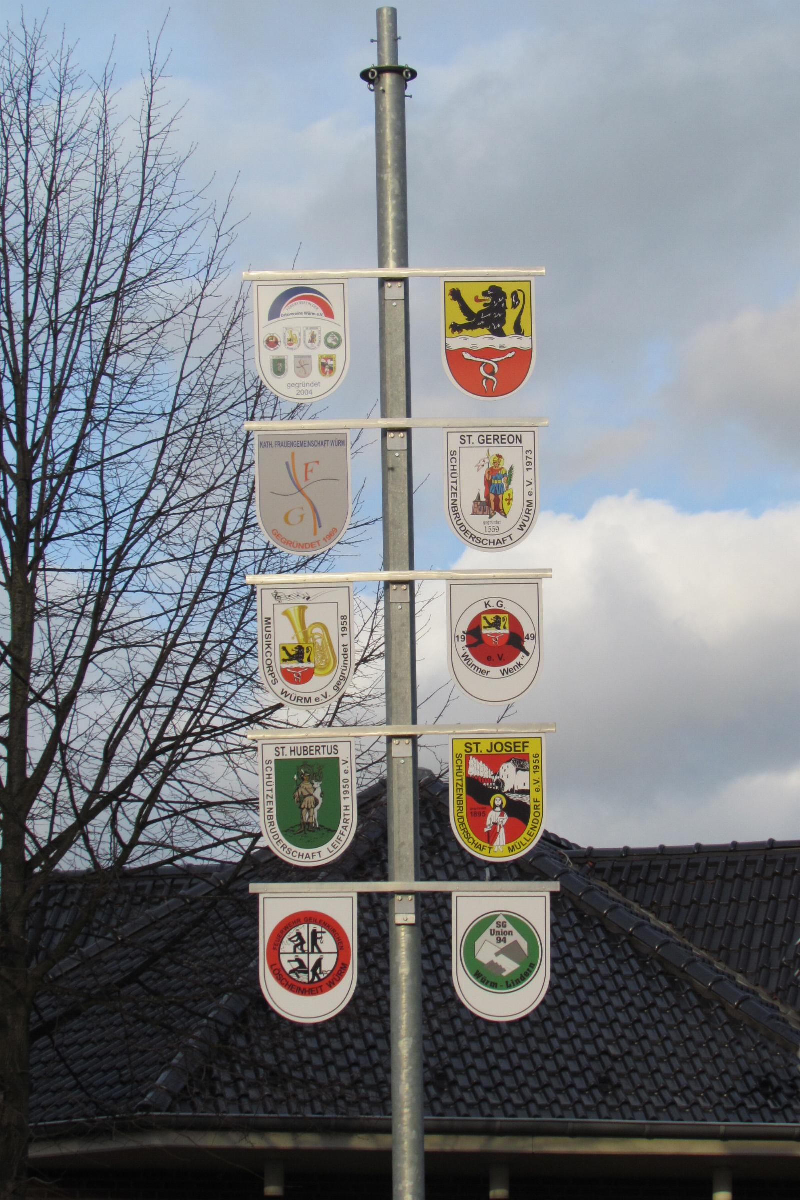 Kirchen und Kapellen in der Stadt Geilenkirchen